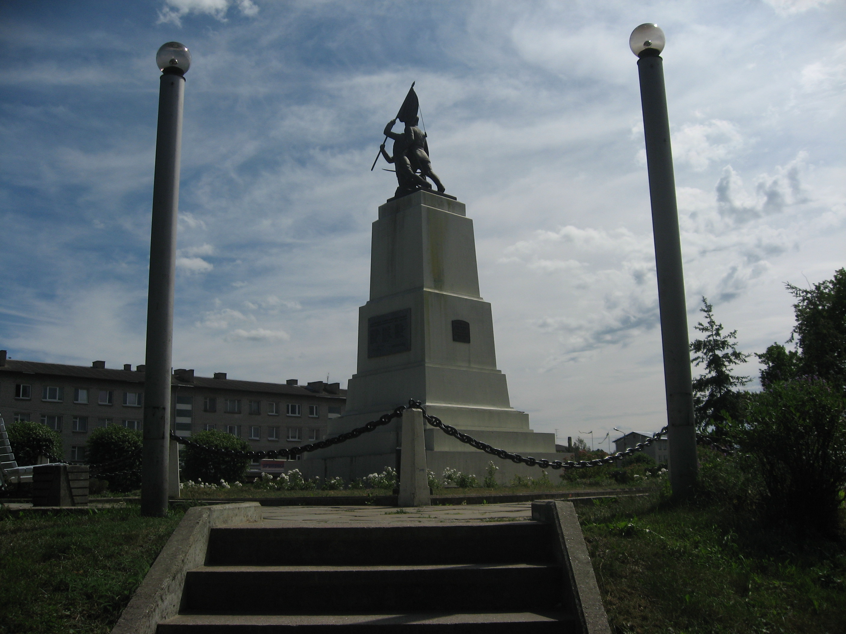 Rakvere, památník